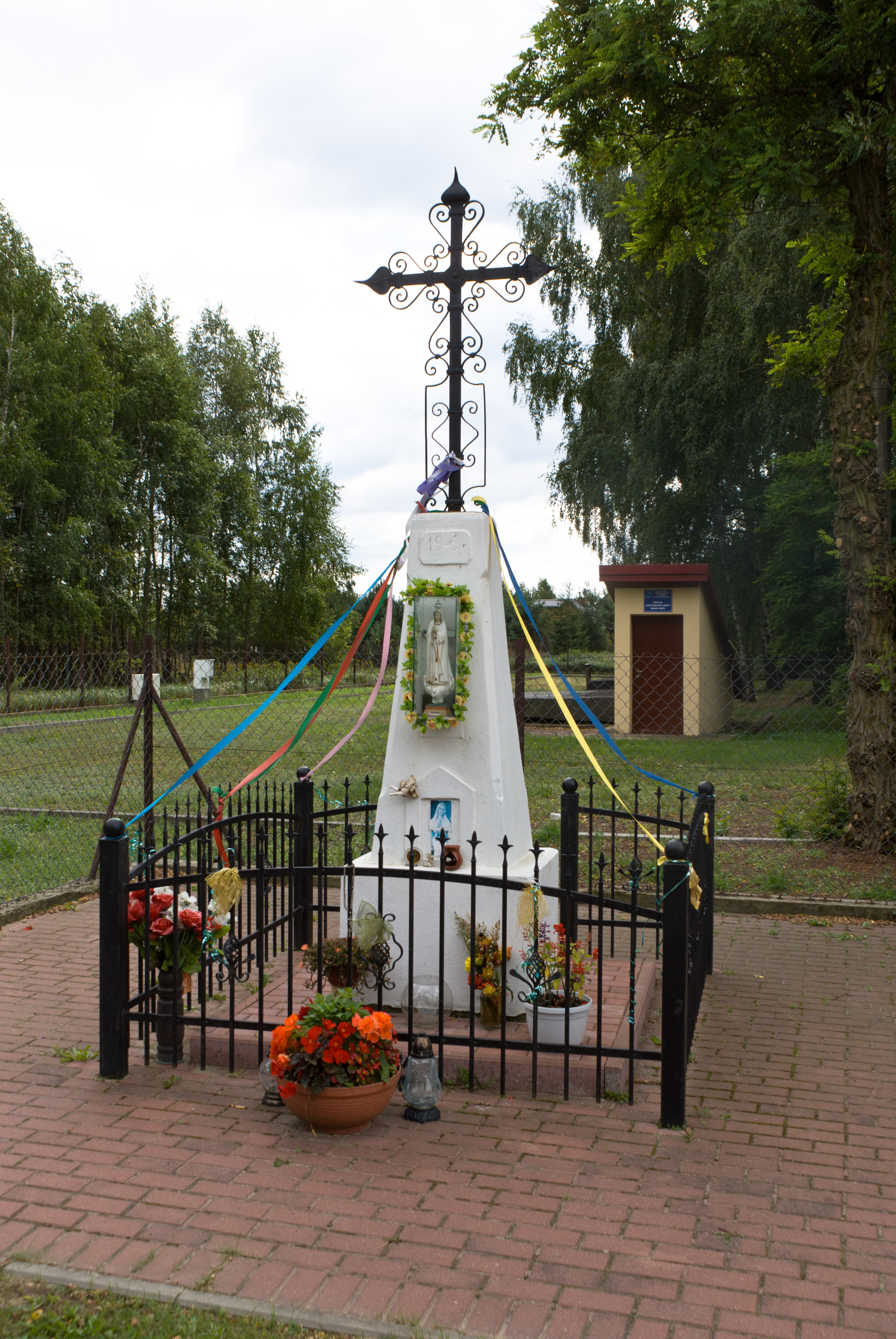 Kapliczka w Nowej Wsi (powiat legionowski).